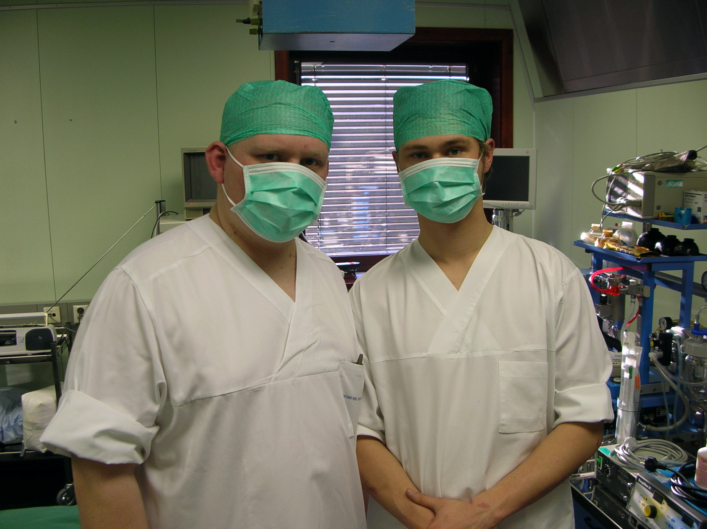 Operasjonssal på Troms militære sykehus